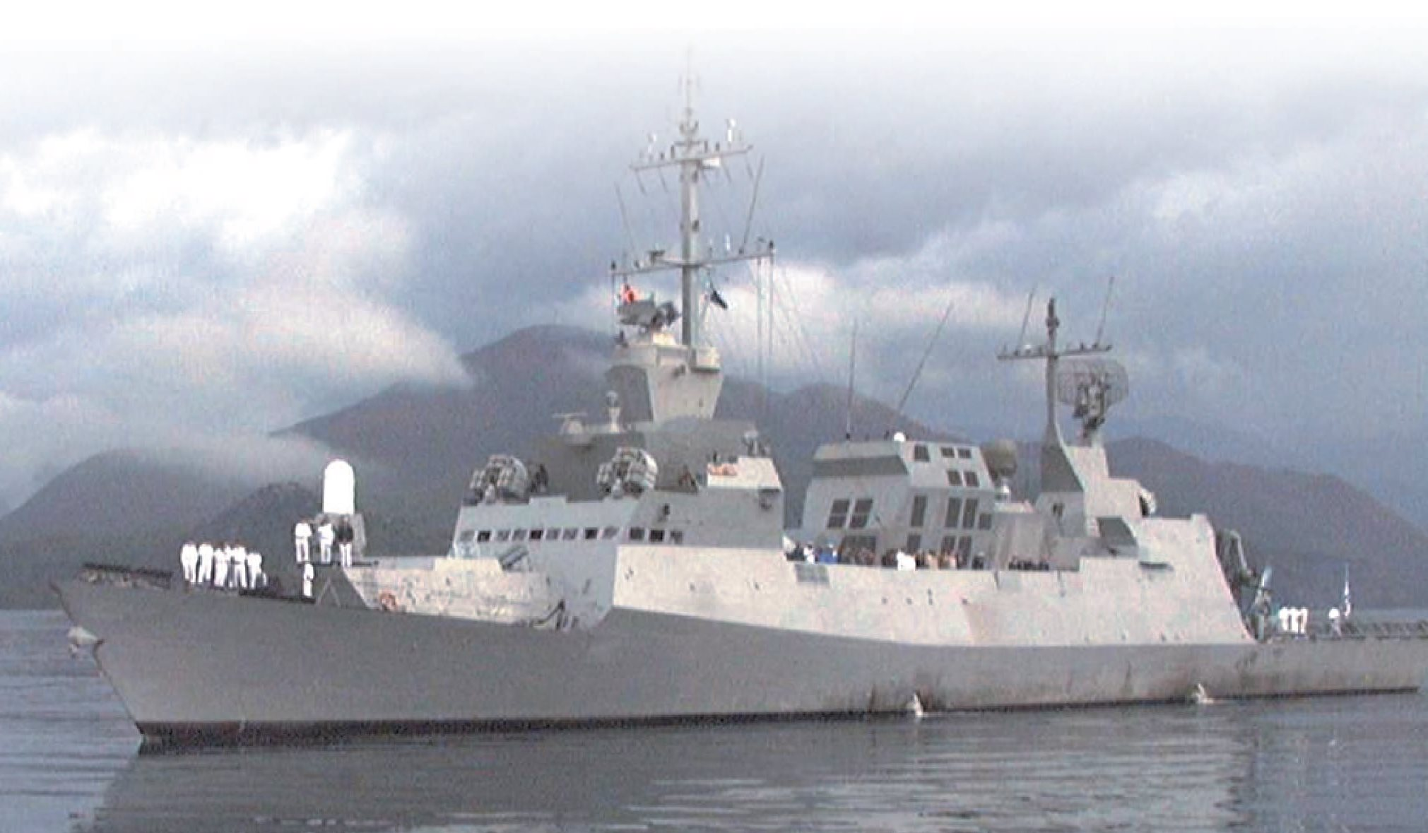 אח"י להב קורבטת טילים מדגם סער 5 על רקע החוף האיטלקי